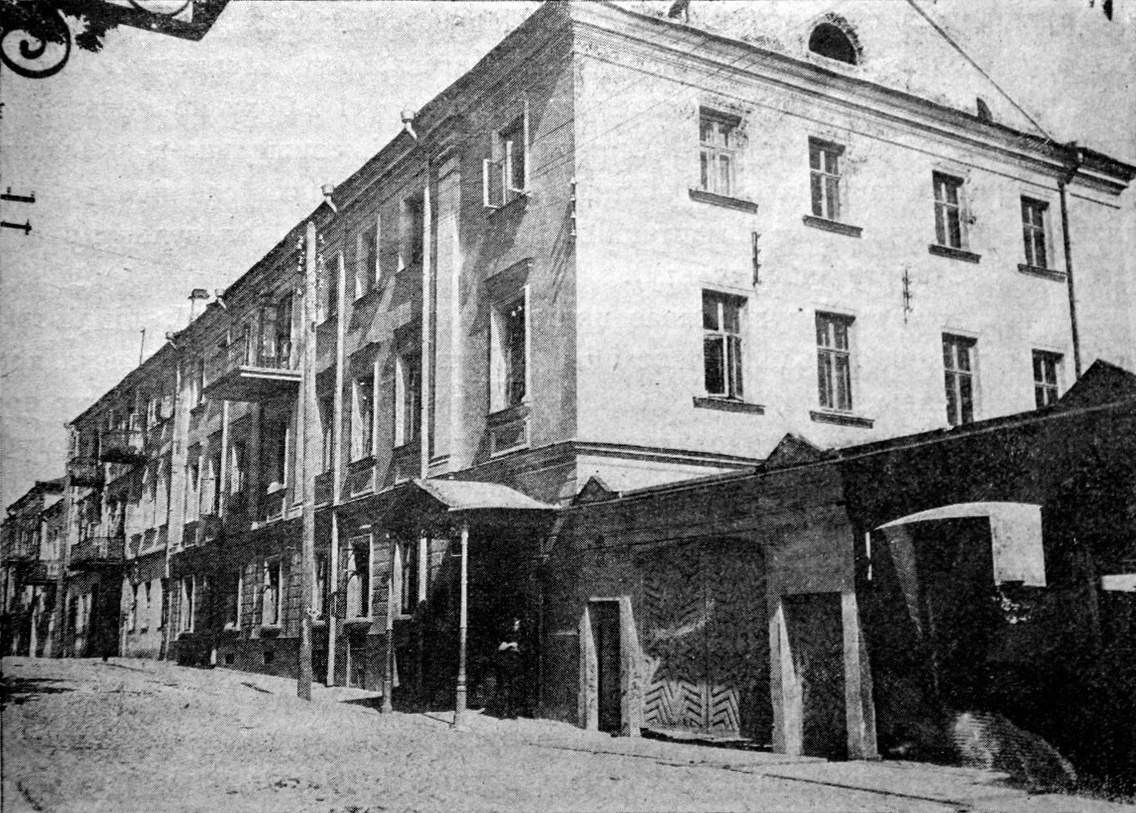 Беларуская (тарашкевіца): Менск (Miensk), вуліца Койданаўская (vulica Kojdanaŭskaja). Будынак, у якім разьмяшчаўся Інстытут беларускай культуры